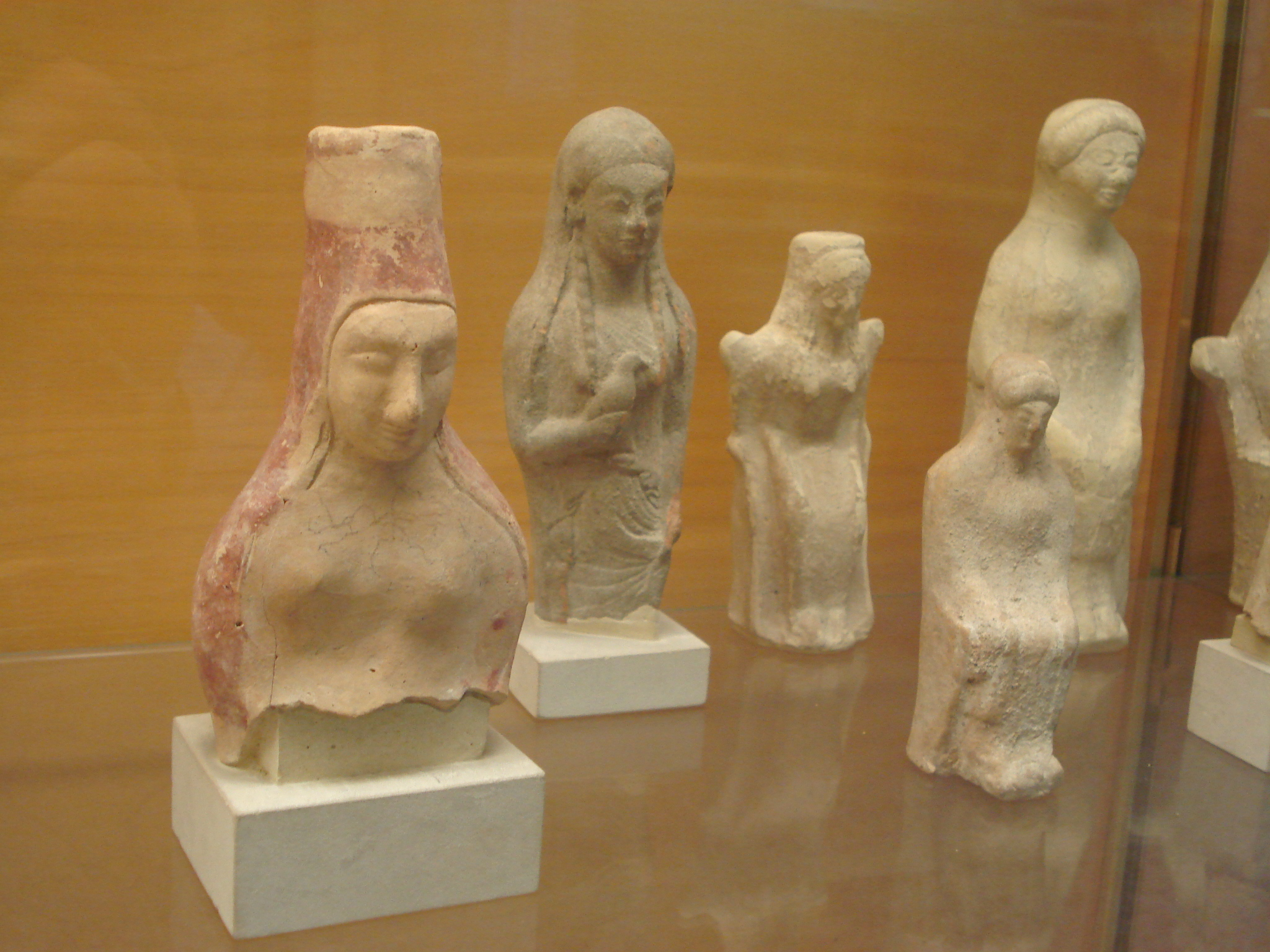 Ex voto greci in terracotta greca da Selinunte (Sicilia), fra cui una kore con in mano una colomba. Museo archeologico regionale di Palermo, 28 settembre 2006. Foto di Giovanni Dall'Orto.